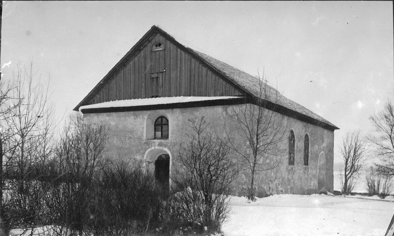 Kyrkan från sydväst.